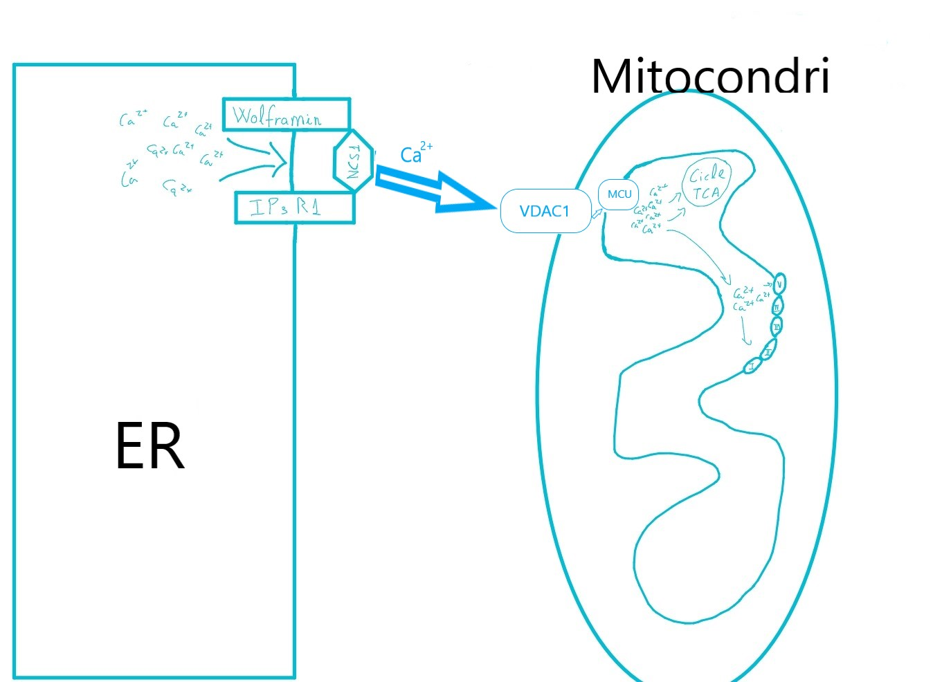 Procés amb el qual el calci pot passar del reticle endoplasmàtic fins al mitocondri amb l'ajuda de la proteïna Wolframin